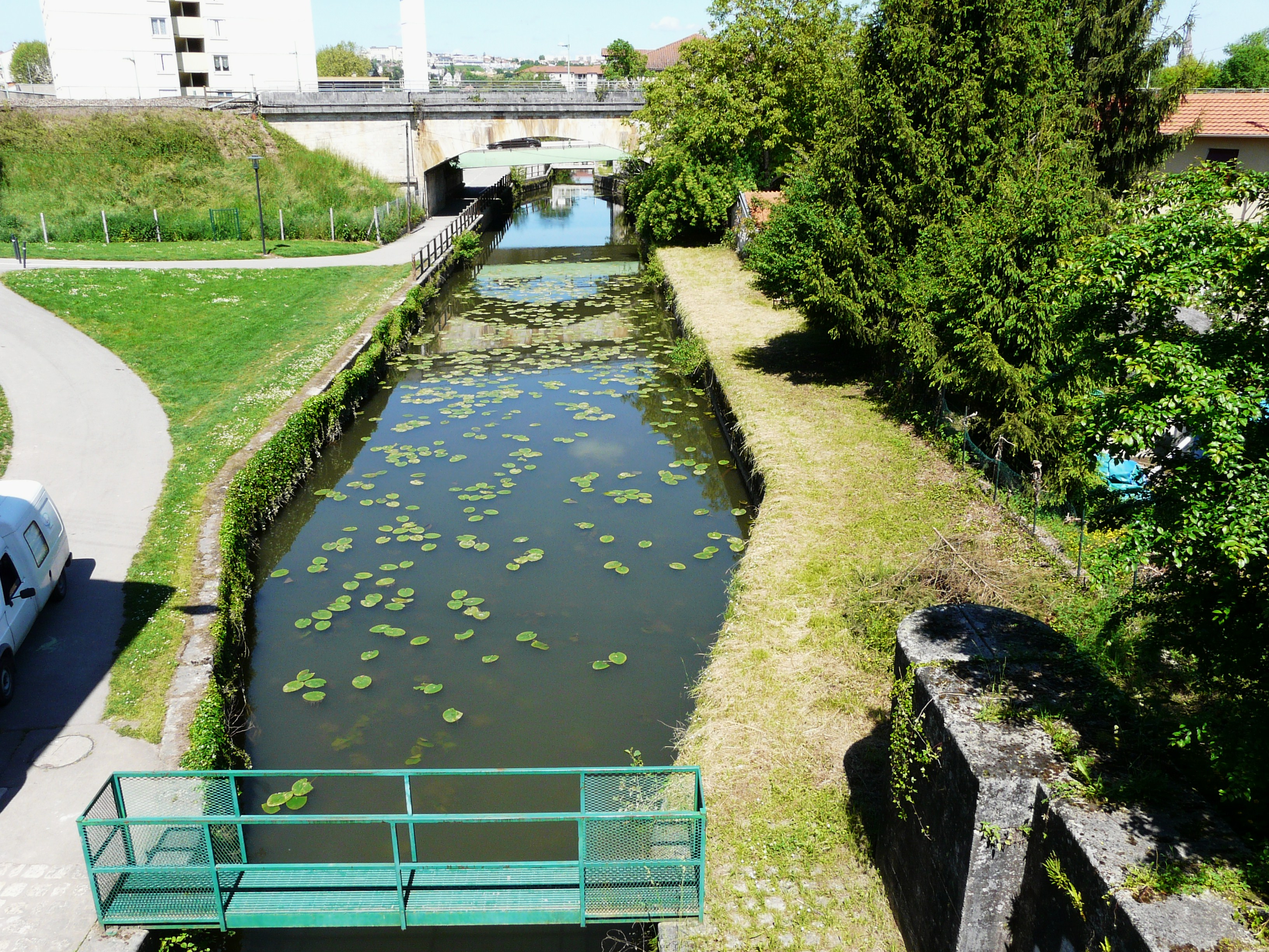 La Voie verte des Berges de l'Isle (à gauche) en bordure du canal de Périgueux, Dordogne, France. En arrière-plan, le viaduc ferroviaire de Sainte-Claire.